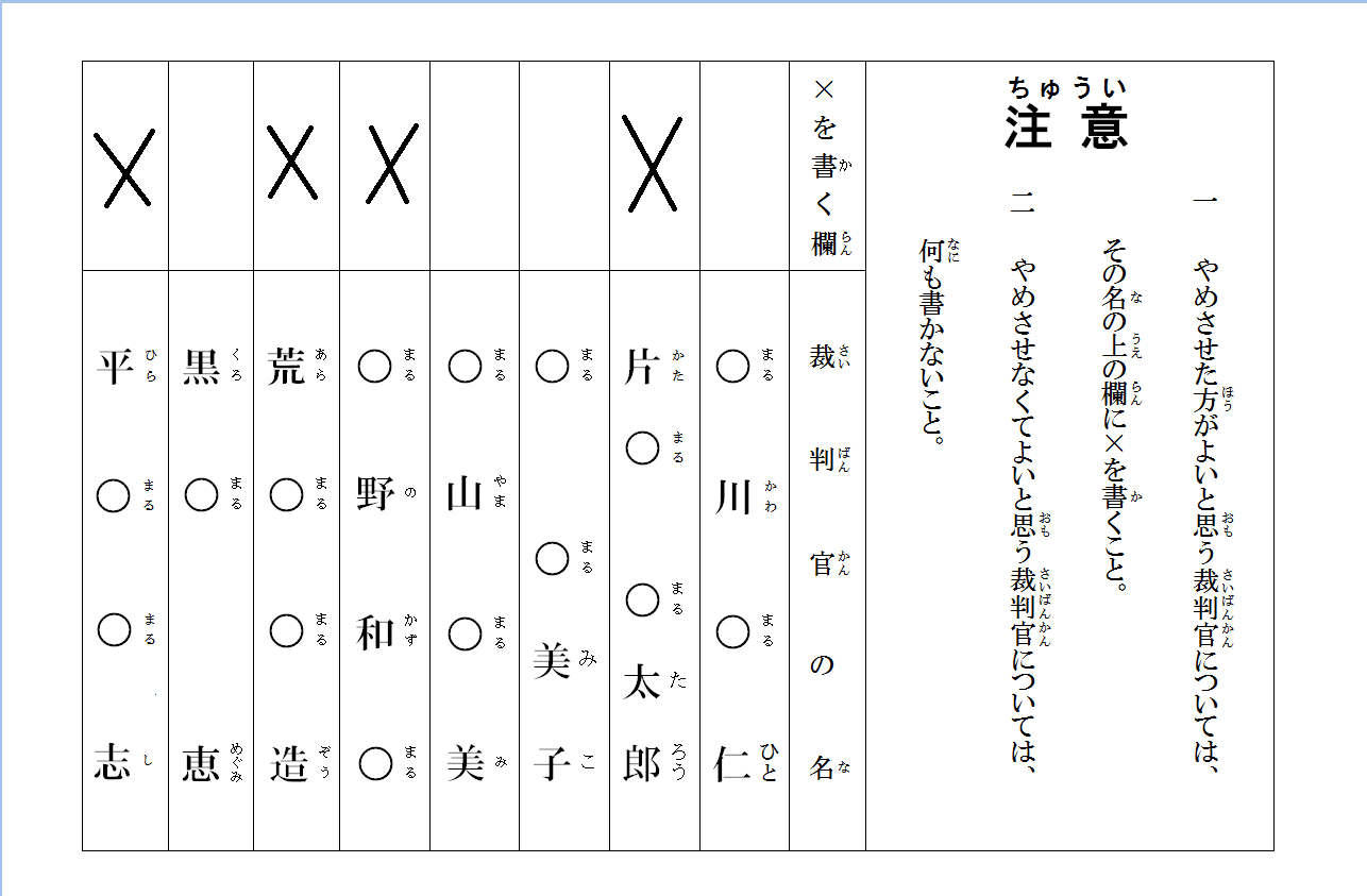 日本国最高裁判所裁判官国民審査 投票用紙 記入例（×だけを書くことができる。○などを書くとすべて無効票になる）